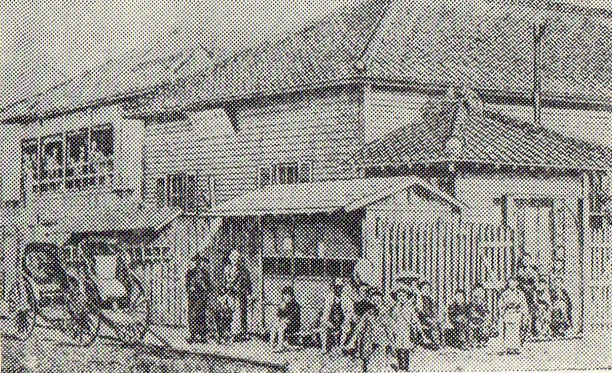 横浜住吉町教会の最初の会堂